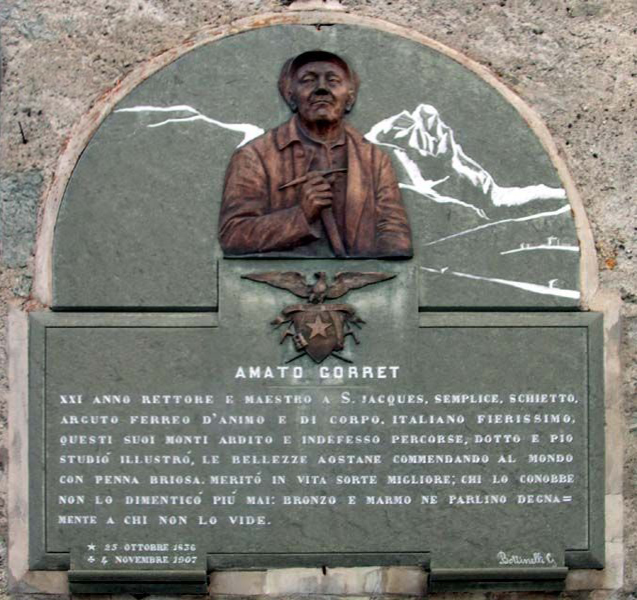 Lapide in ricordo dell'Abbé Gorret a a Saint-Jacques-des-Allemands, alla sommità della val d'Ayas, dove fu rettore.